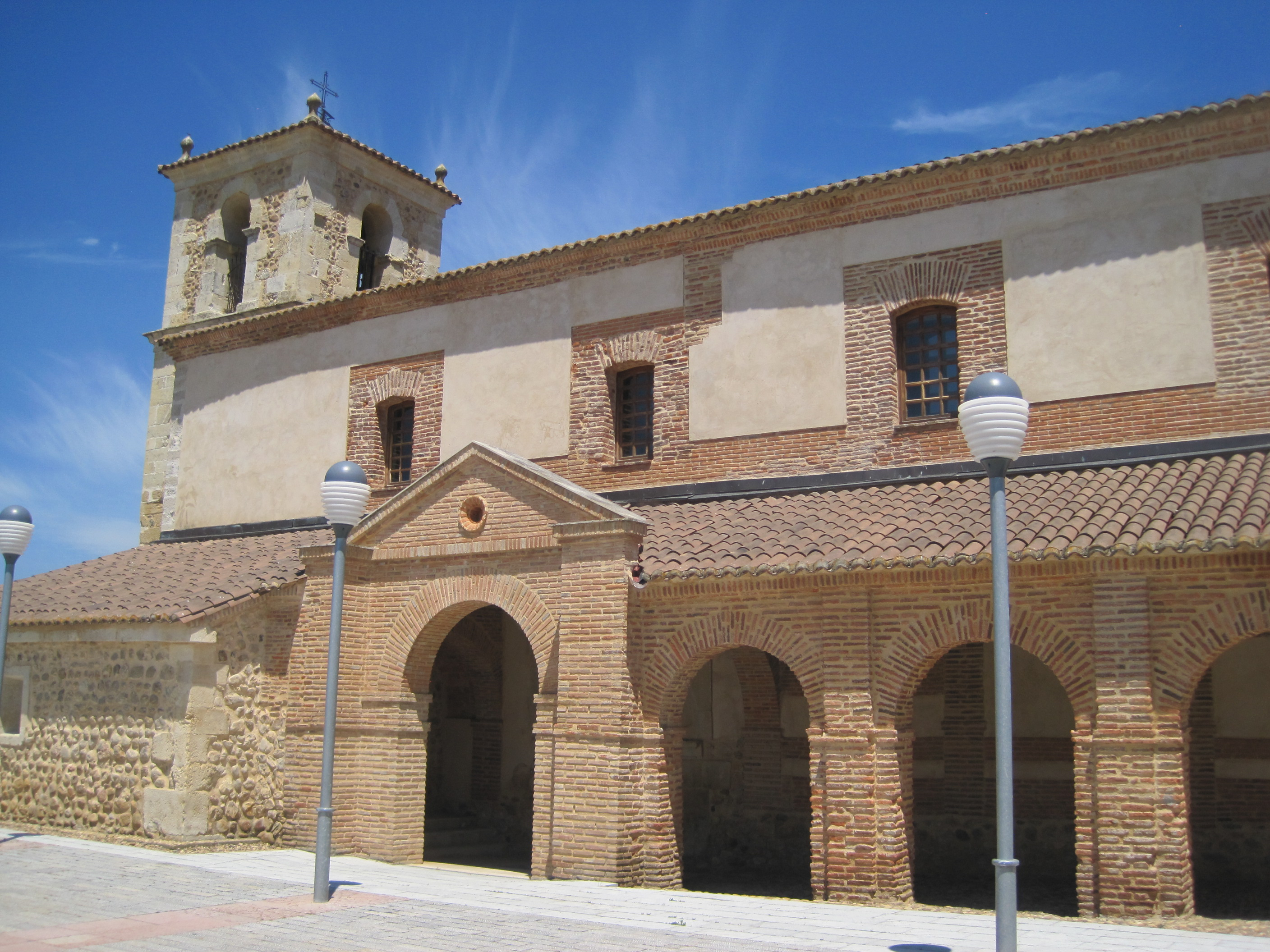 Iglesia de San Juan Bautista, en Cerezales del Condado (León, España).